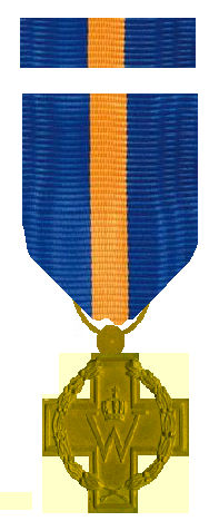 Kruis van Verdienste van na 2000